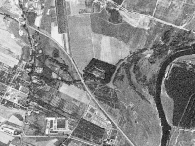 Fort IVa Twierdzy Poznań sfotografowany przez satelitę KH-4A 1023, 23 sierpnia 1965 r.